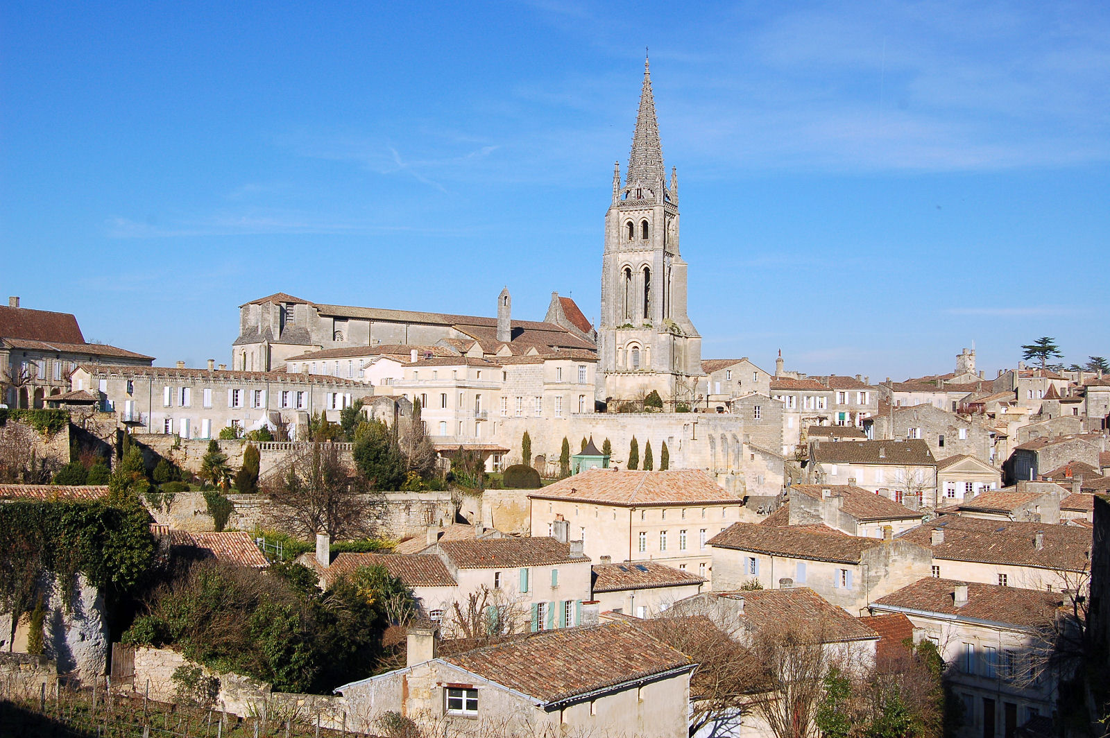 Saint Emilion (Gironde, France)